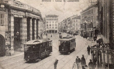 Brescia, corso Zanardelli